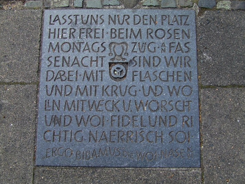 Reservierter Platz am Mainzer Rosenmontagsumzug für "Die Woi-Nase" auf dem Schillerplatz in Mainz. Text auf der Reservierung: Lasst uns nur den Platz hier frei beim Rosenmontagszug an Fassenacht sind wir dabei mit Flaschen und mit Krug und wolln mit Weck u. Worscht und Woi fidel und richtig Naerrisch soi. – Ergo Bibamus Die Woi-Nase. K94 Die hier versammelten Woi-Nase stammen aus der Ehrbaren Mainzer Weinzunft von 1443